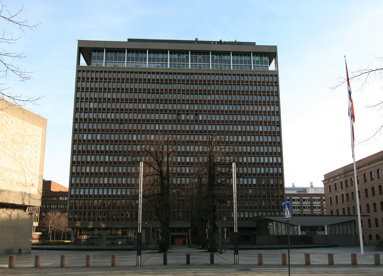 Regjeringskvartalet, H-blokken.